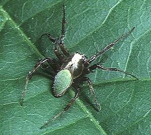 male Neoscona mellotteei from Okinawa.